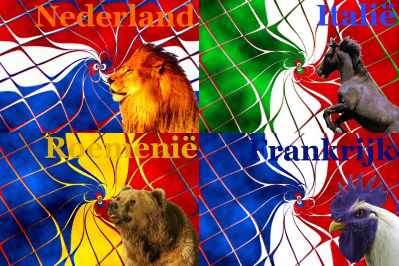 grafisch ontwerp voor pool c van het ek 2008